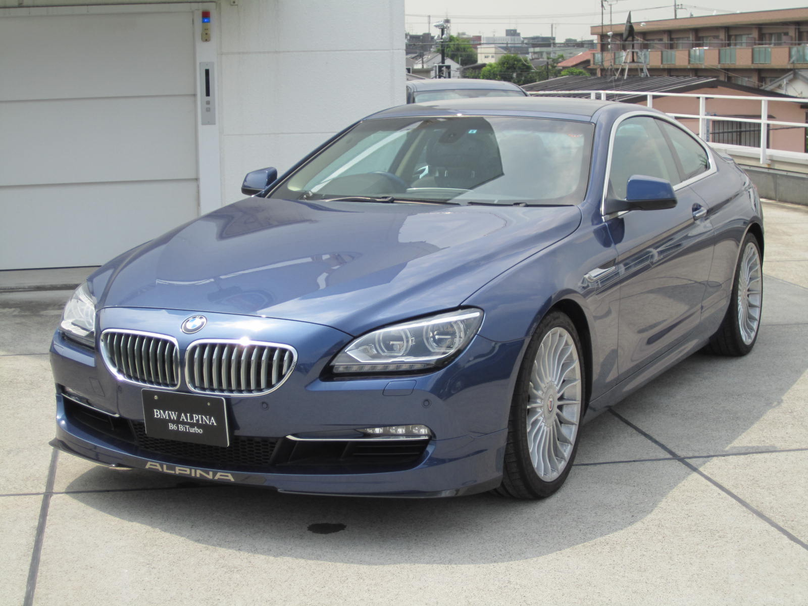 B6フロント